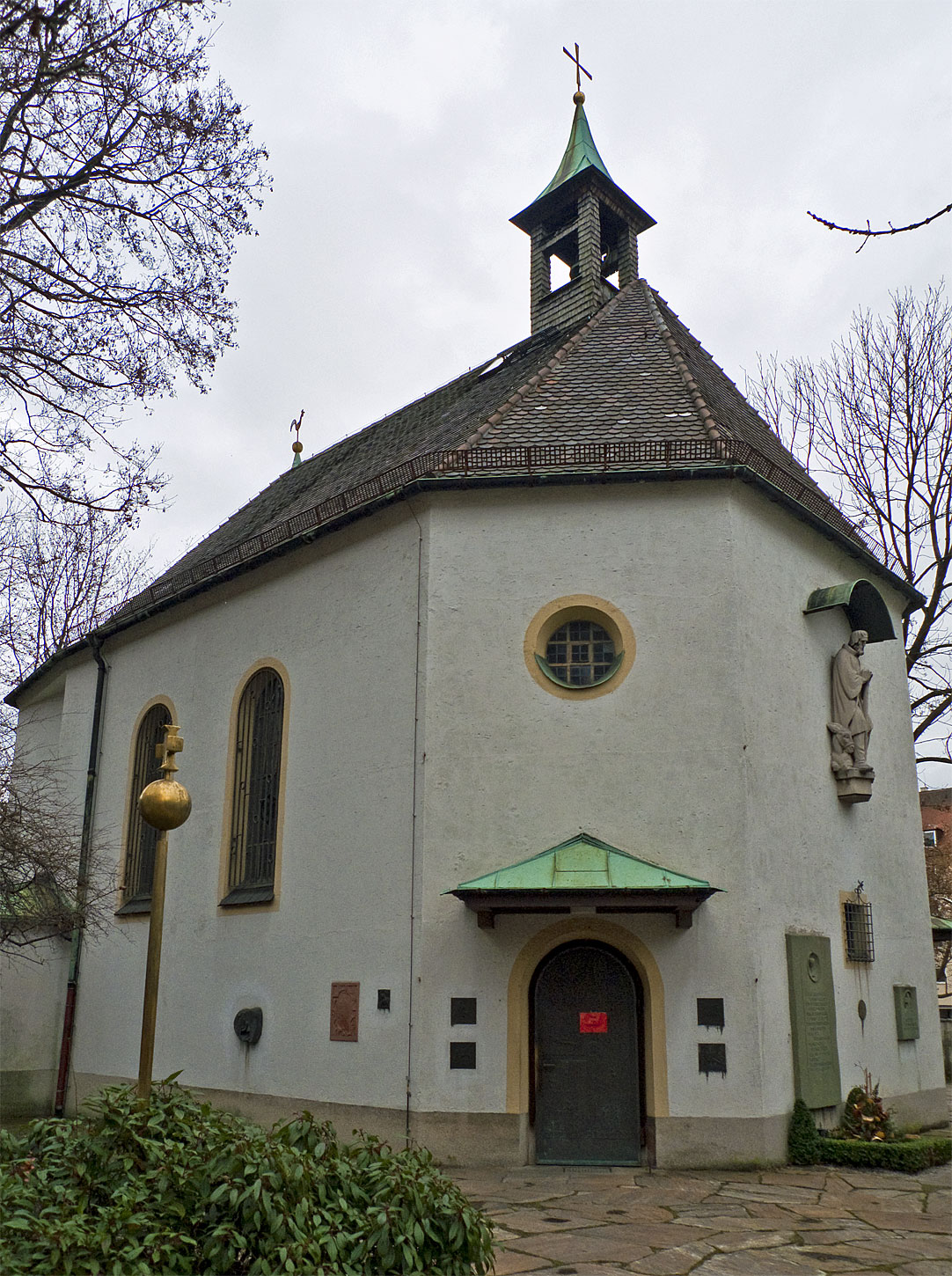 Winthirkirche München